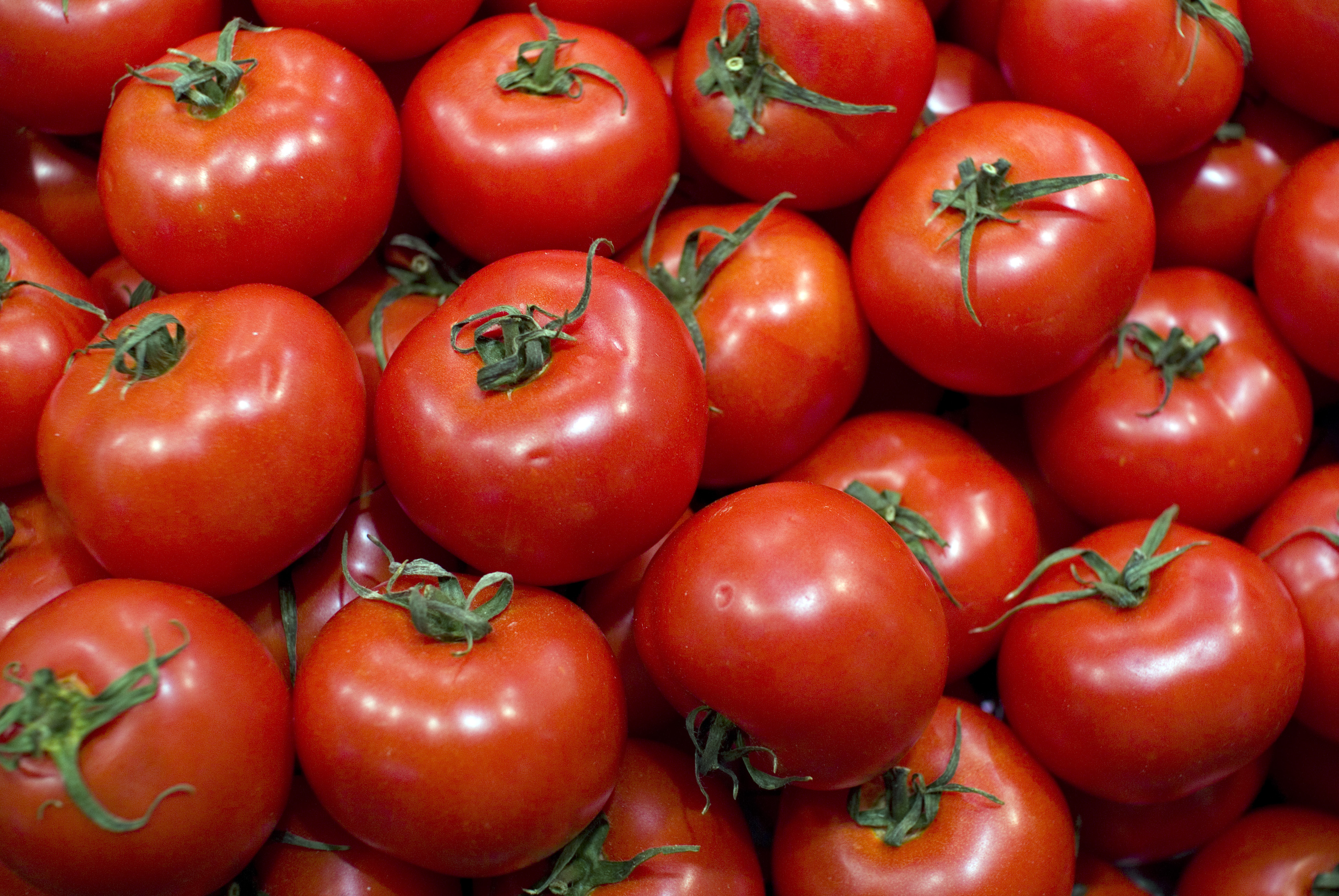 Tomates.